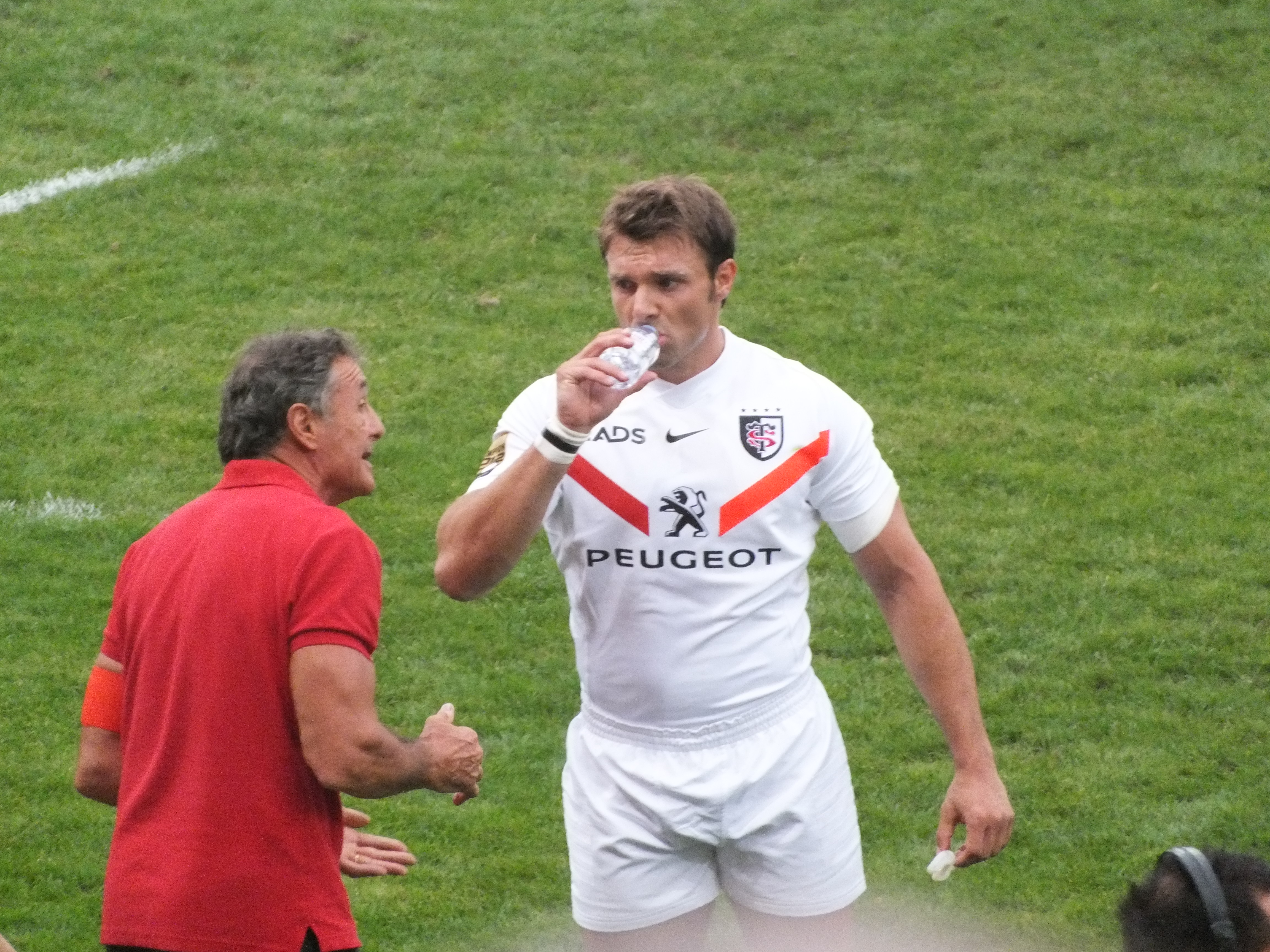 Top 14 — 25 August 2012, Stade Ernest-Wallon. Match between: Stade toulousain — Stade montois